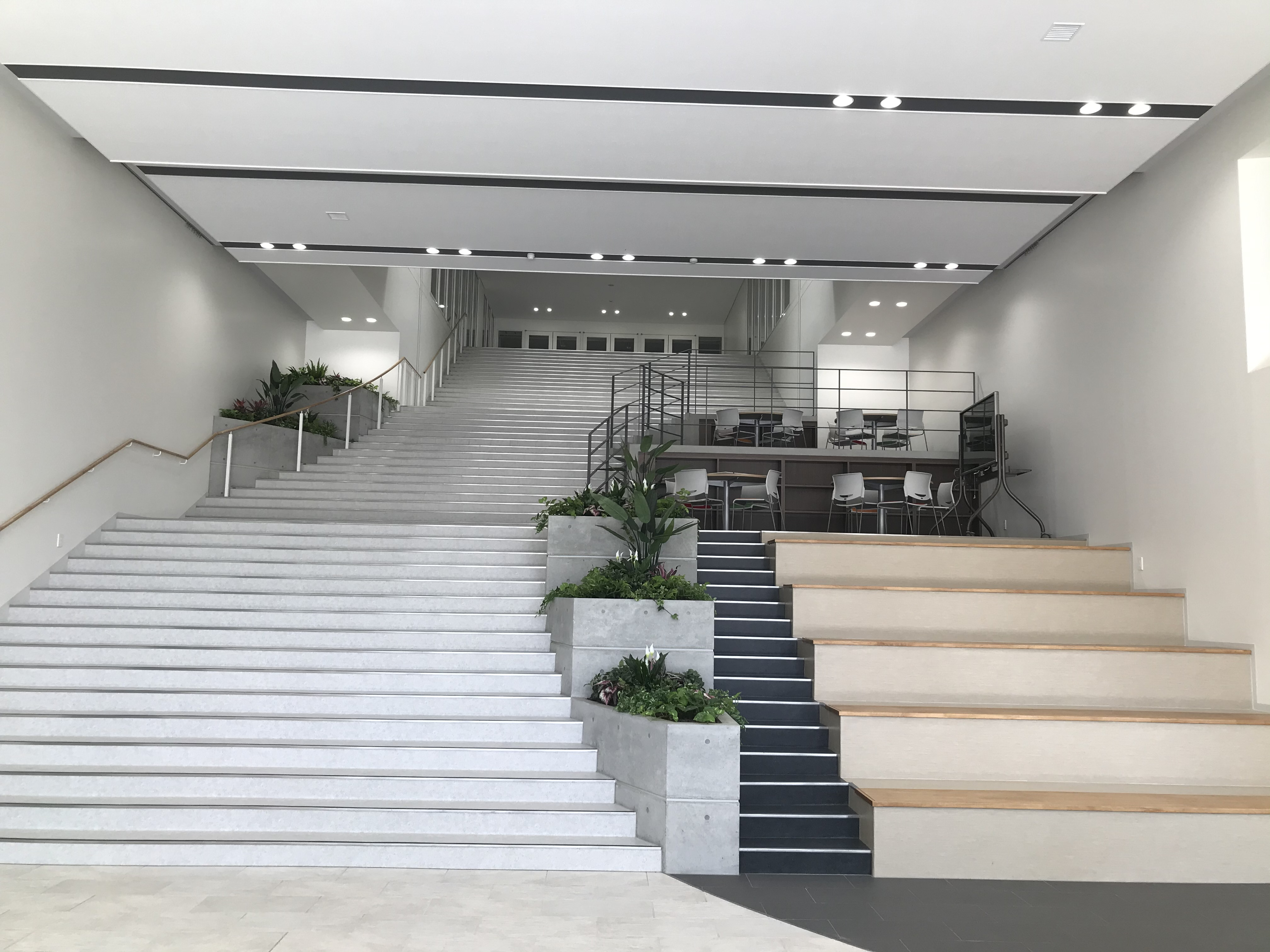 大阪青凌中学校・高等学校の正門を入って正面に見えるライジングヒルと呼ばれる階段です。たしか55段のはずです。階段を登ると下足箱があり、奥には職員室もあります。